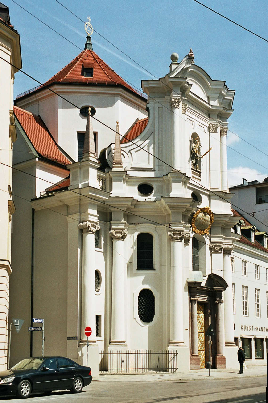 München, Dreifaltigkeitskirche